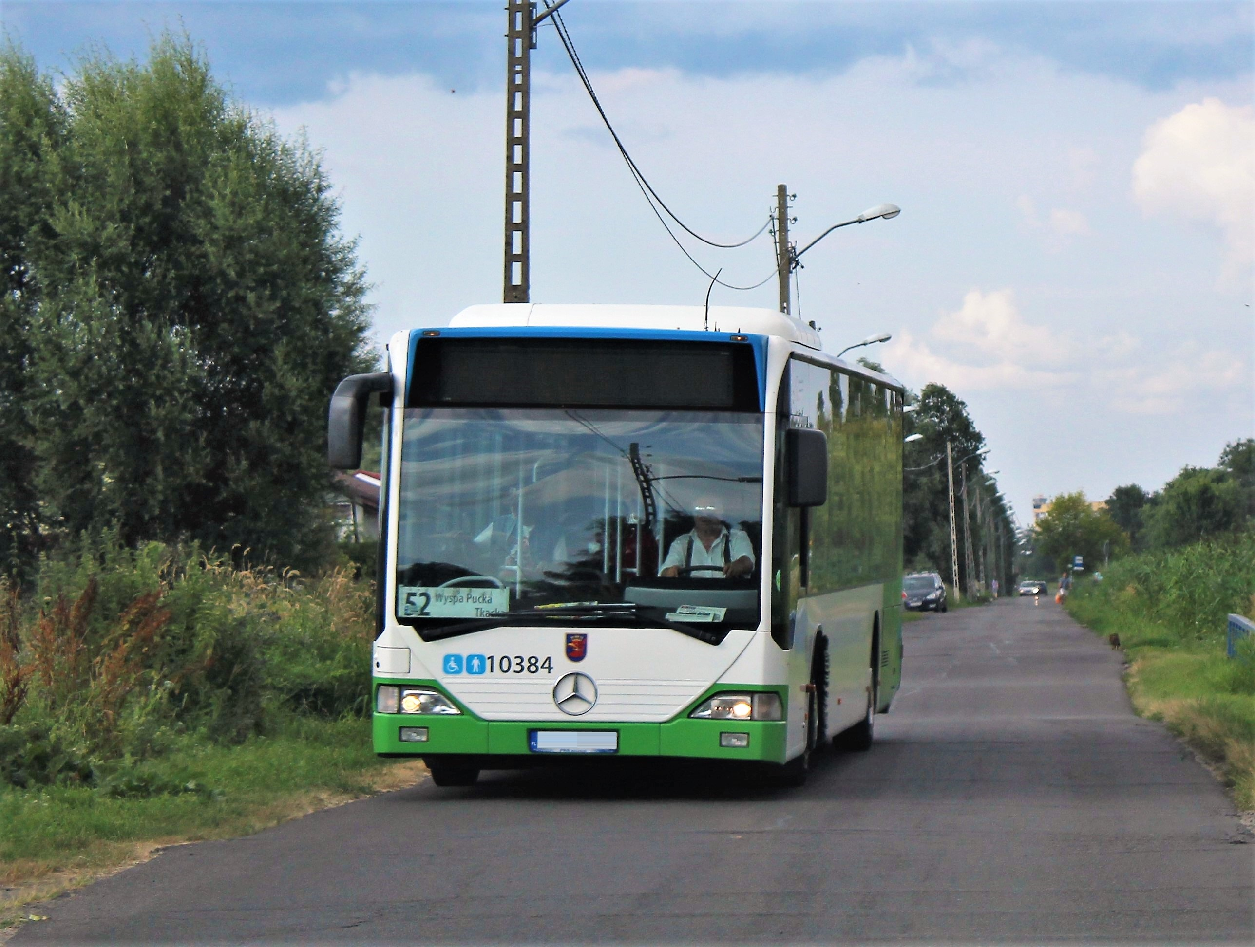 Mercedes-Benz O530 nr 10384 w Szczecinie, 2019 r.